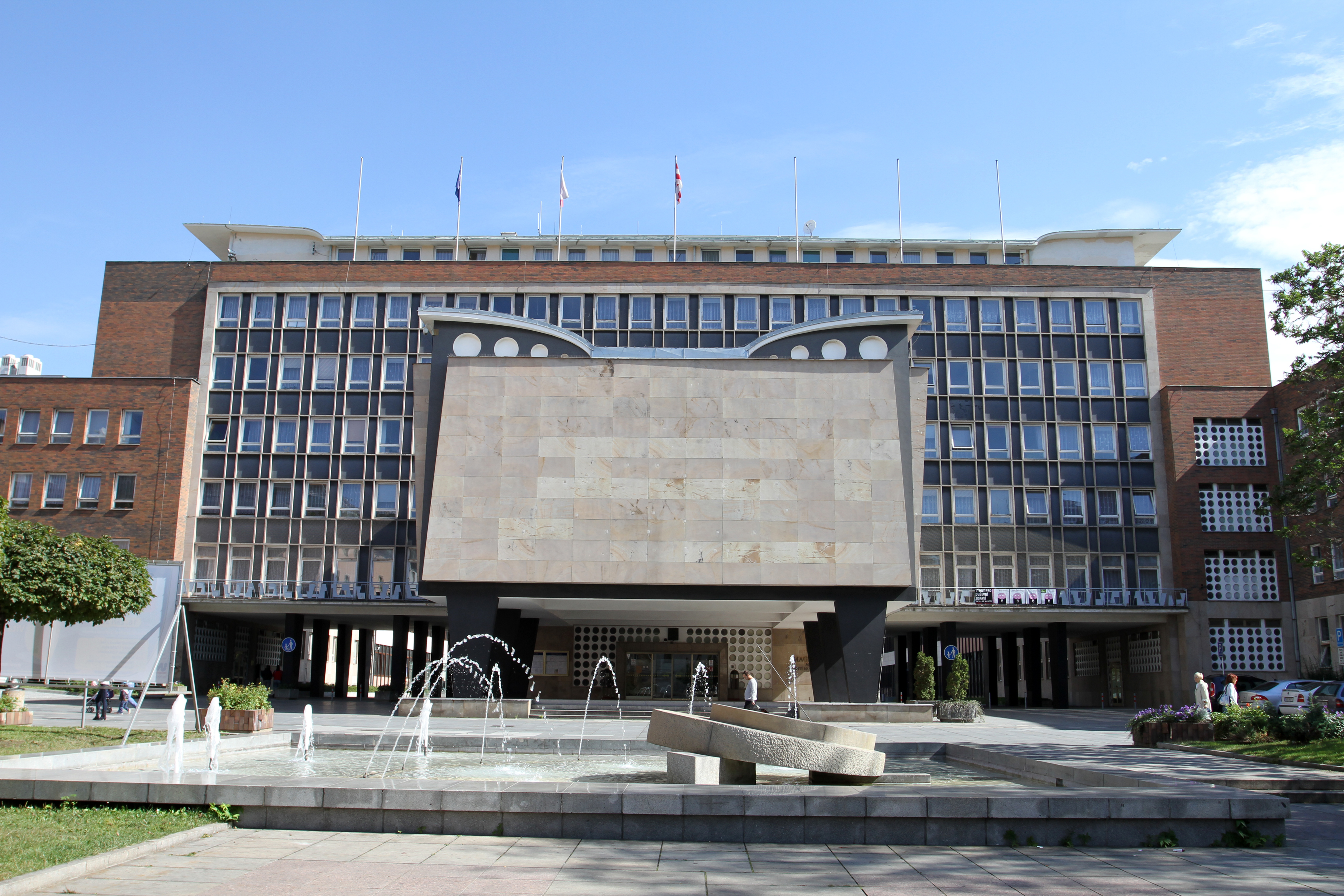 Magistrát, Velká Hradební 2336/8, Ústí nad Labem-centrum.